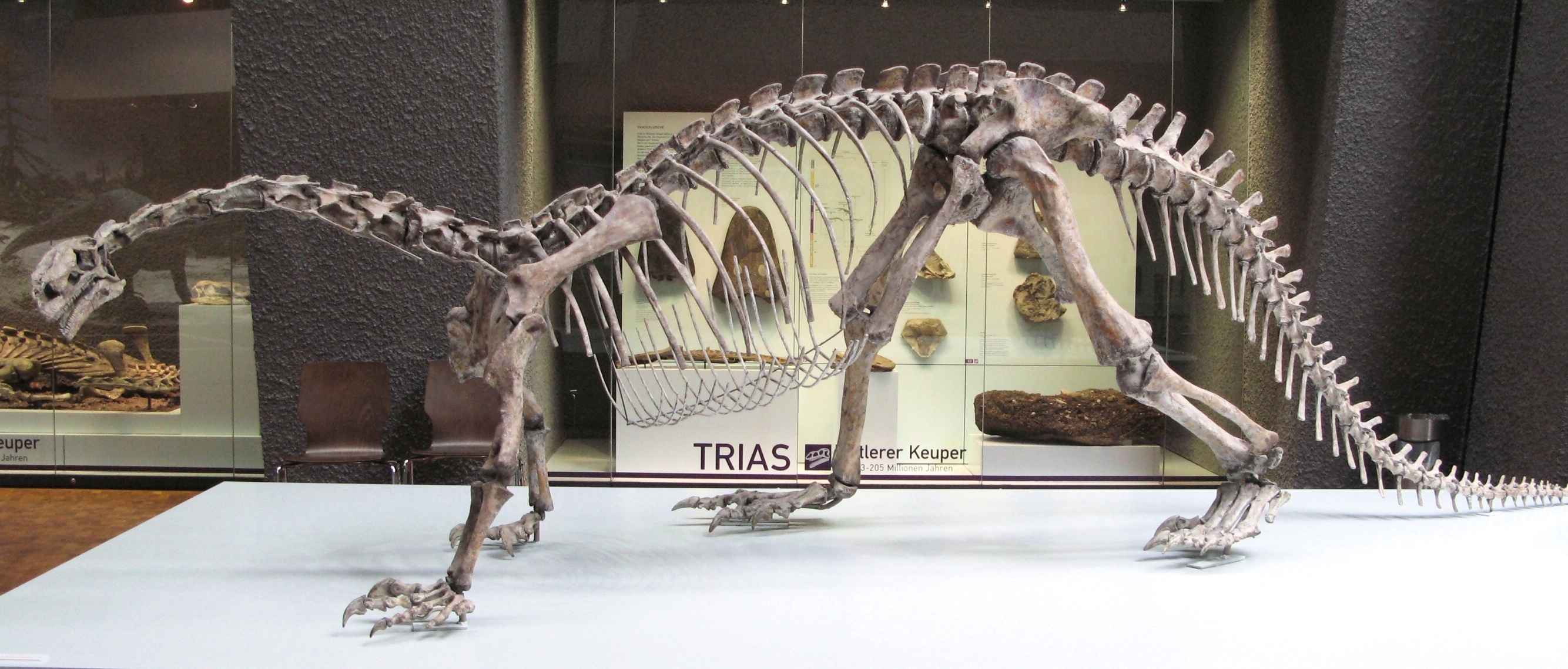 Plateosaurus engelhardti (cast of SMNS 13200), Knollenmergel der Trossingen-Formation (Landkreis Tuttlingen) - Trias, mittlerer Keuper - aufgenommen im Museum am Löwentor, Stuttgart